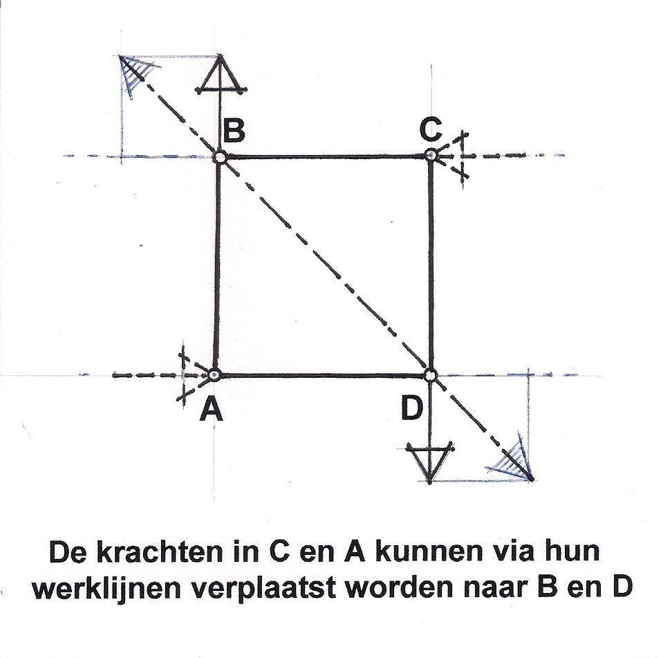 eigen werk